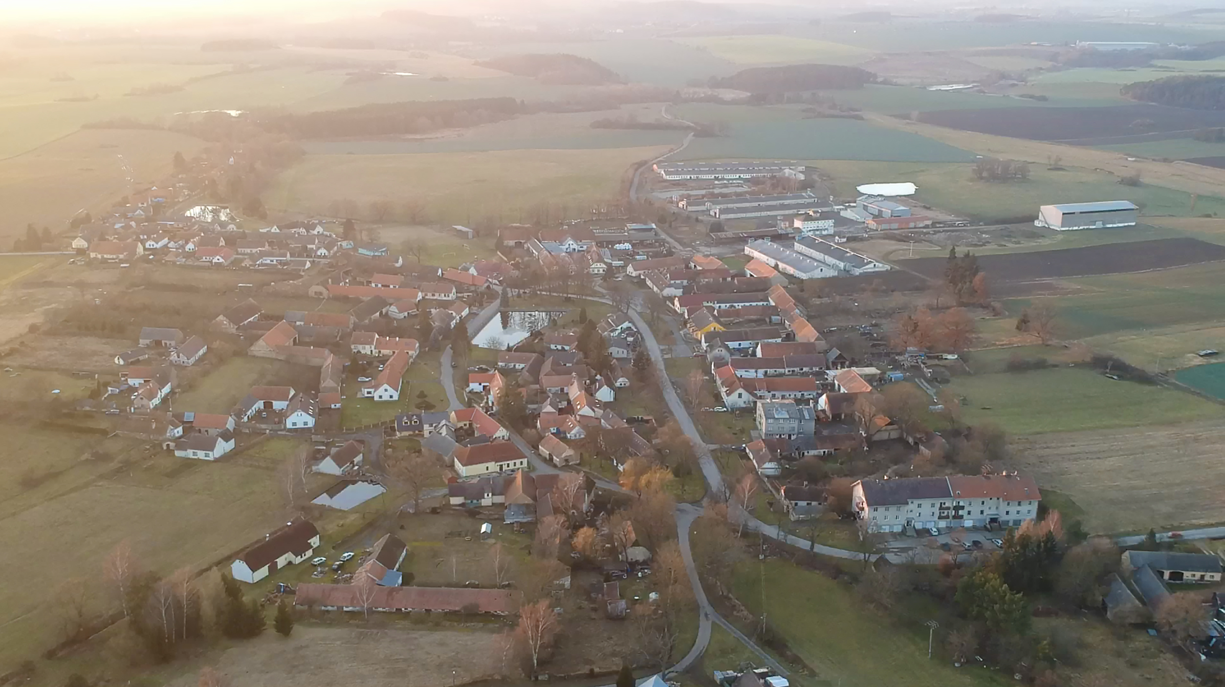 Letecký snímek obce Králova Lhota (Písek)